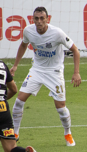 Foto: Douglas Teixeira/Futebol Santista